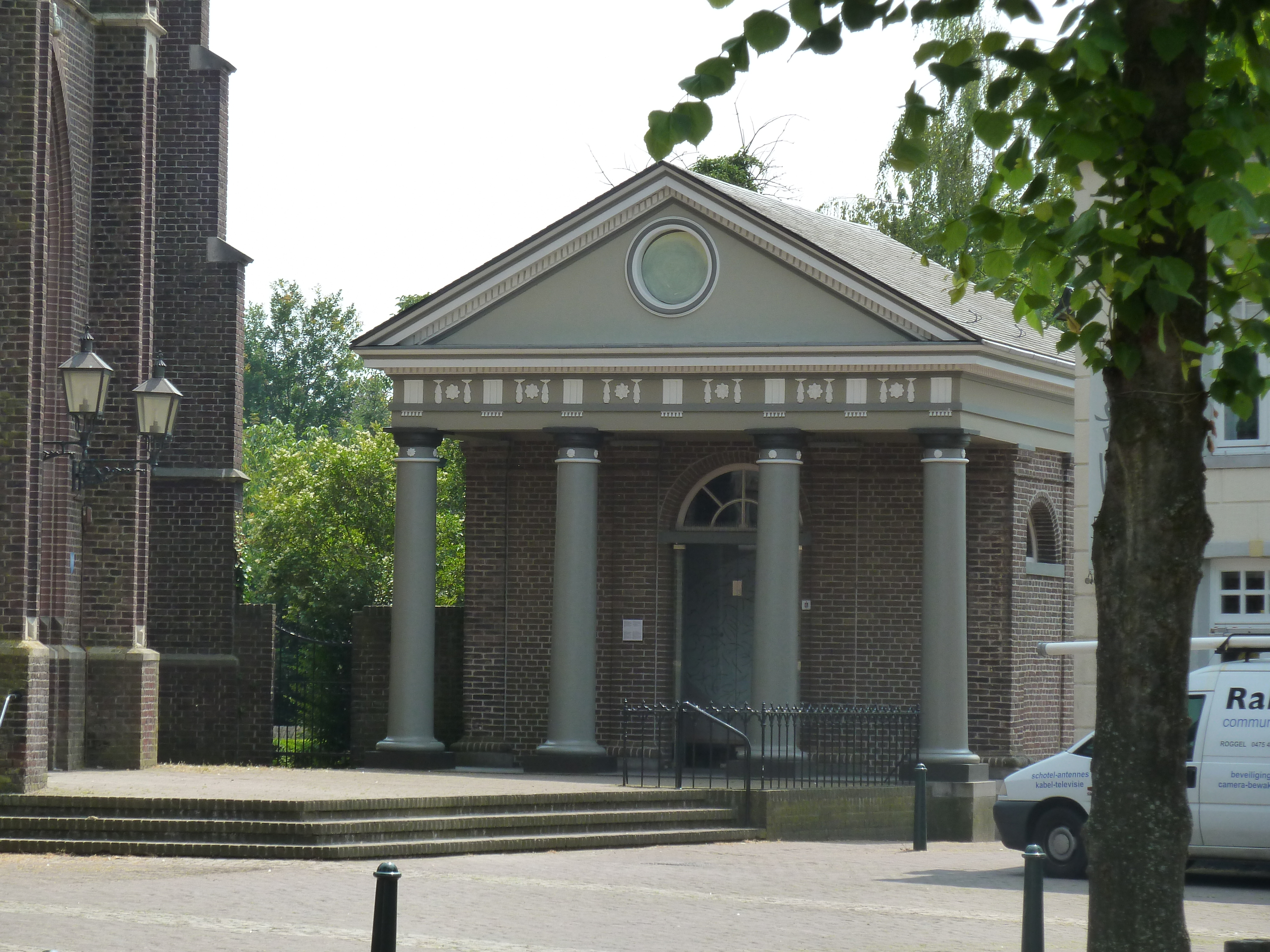 Missiekapel, Heythuysen, Nederland